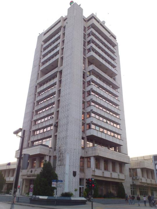 Сграда на Общината